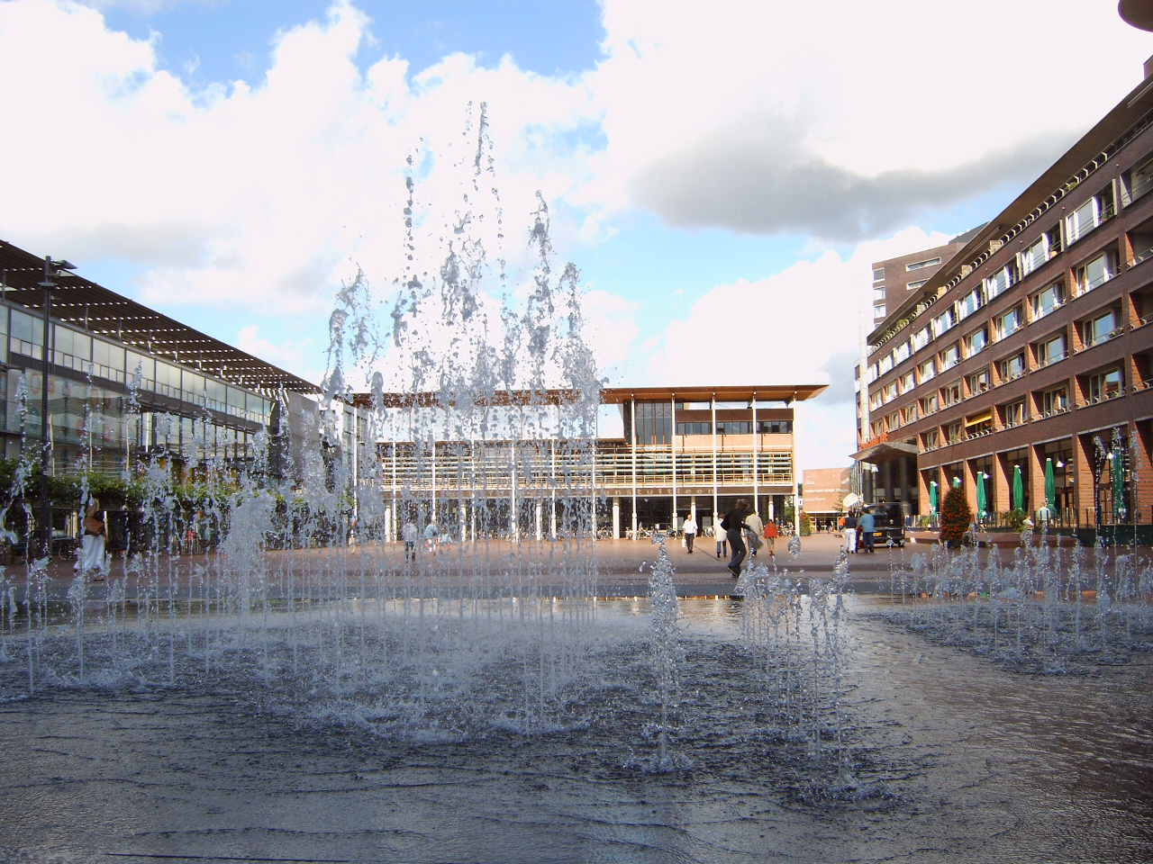 zelfgemaakte foto door Martin van Dalen Opname gemaakt op 28 augustus 2004. Stadshart Amstelveen, links: cultureel centrum, midden: bibliotheek en kunstuitleen, rechts: winkelcentrum.